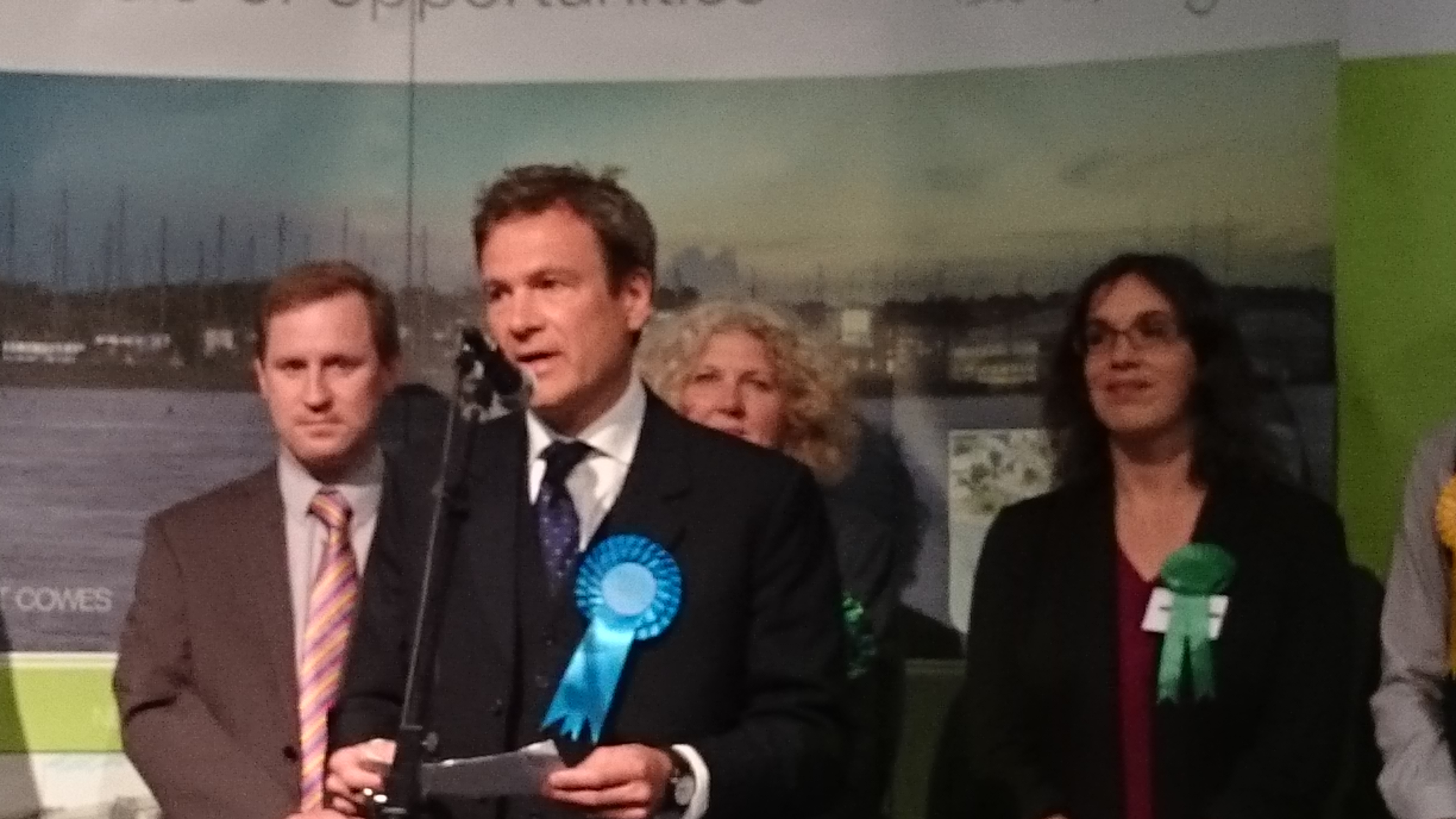 Robert Seely